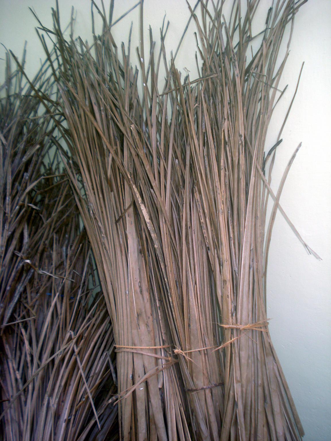 ഉണങ്ങിയ തെങ്ങോല പാന്തം ഉപയോഗിച്ച് കെട്ടിയിരിക്കുന്നു.